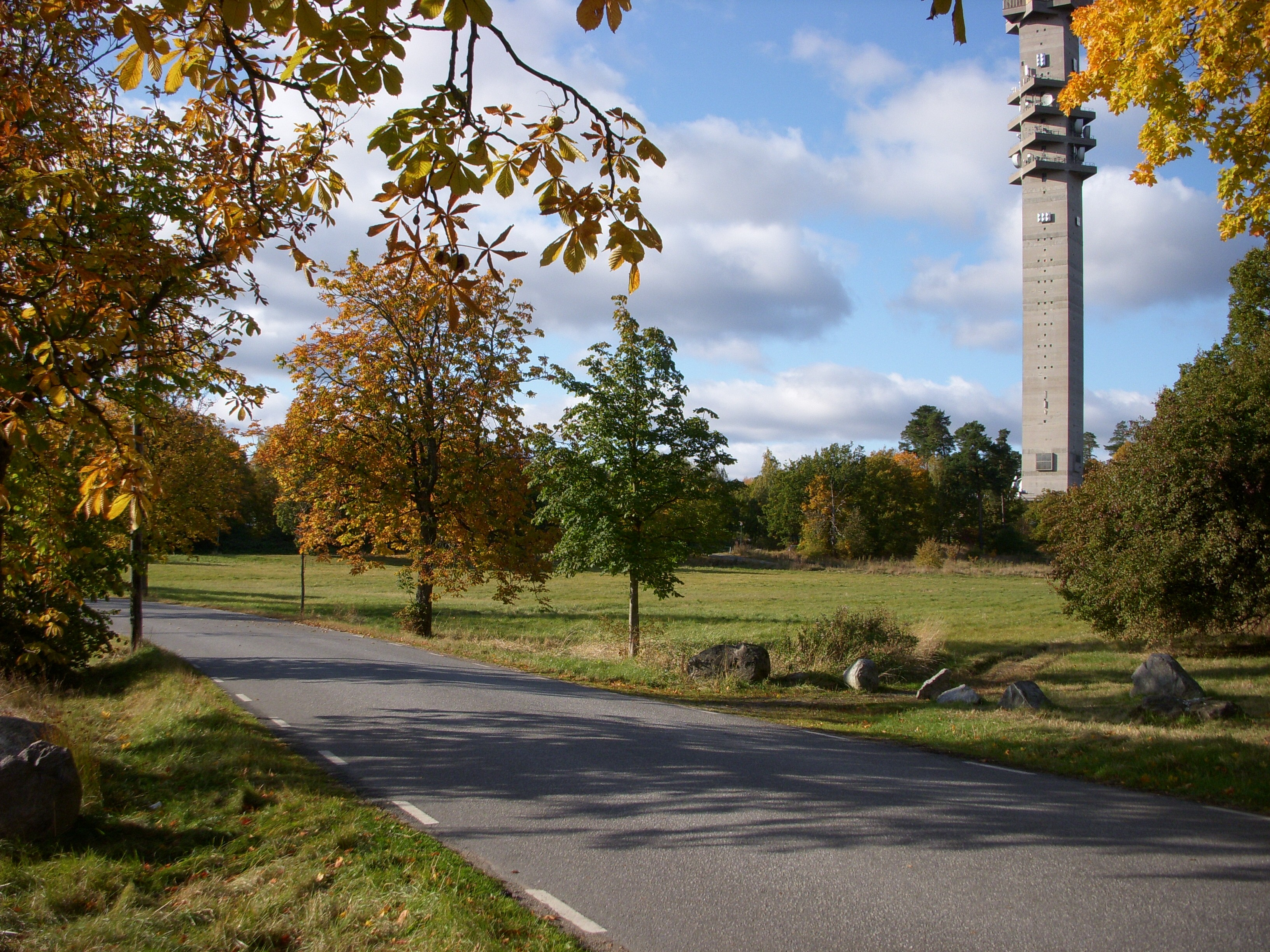 Kaknäsvägen på Gärdet i Stockholm